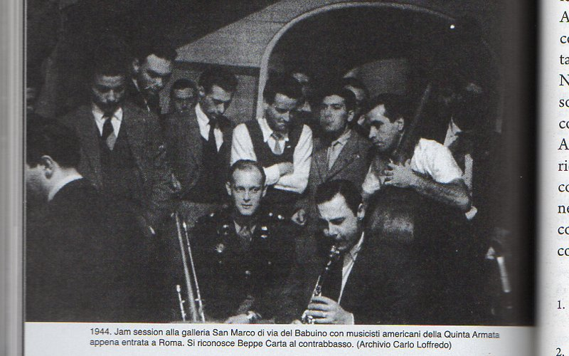 Foto storica del 1944 di archivio Carlo Loffredo tratta da libro Sardinia Hot Jazz di Claudio Loi Aipsa edizioni 2011